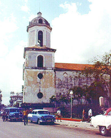 Iglesia de la Asunción (1721).